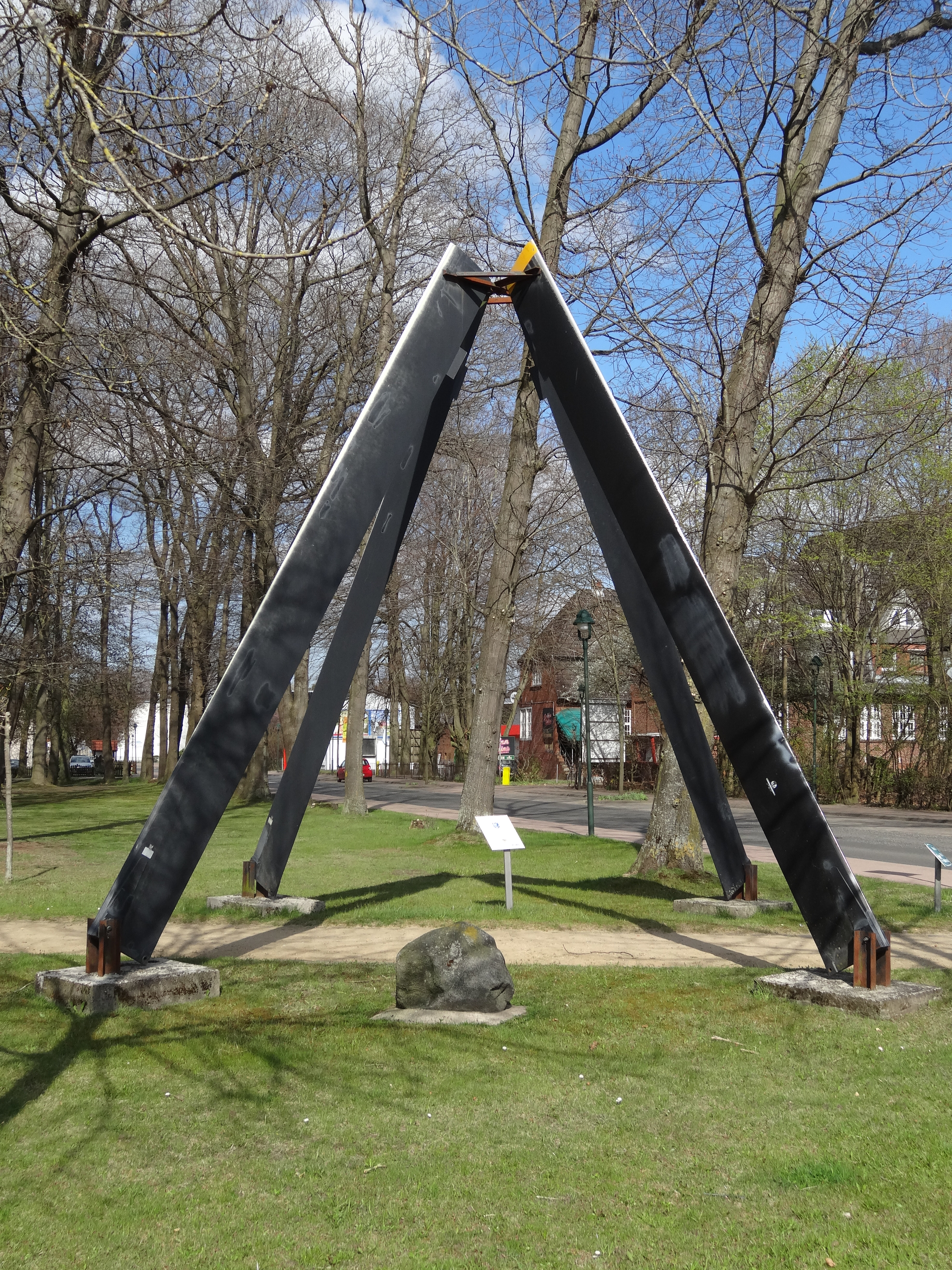 Hohenlockstedt, Rotorbätter des Hubschraubers Bell UH-1D als Erinnerung an das Heeresfliegerbataillon 6 auf dem Flugplatz "Hungriger Wolf"